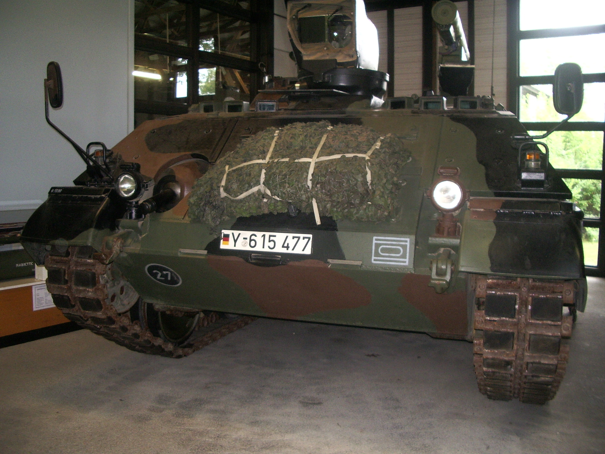 Jagdpanzer "Jaguar 1 A3" Besatzung: 4 Soldaten Gewicht: 26,1 Tonnen Motorleistung: 368 kW (500PS) Bewaffnung: Lenkflugkörper HOT, sowie Bug- u. Fliegerabw.- MG Kaliber 7,62 mm Besonderheiten: Nachtkampffähig, ABC-Schutz, Wärmebildgerät für den Richtschützen, Bildverstärkergerät Anmerkung: Umgerüstet aus RakJgPZ 2(1978 - 1981) Einsatz Bundeswehr: 1981 - 2005